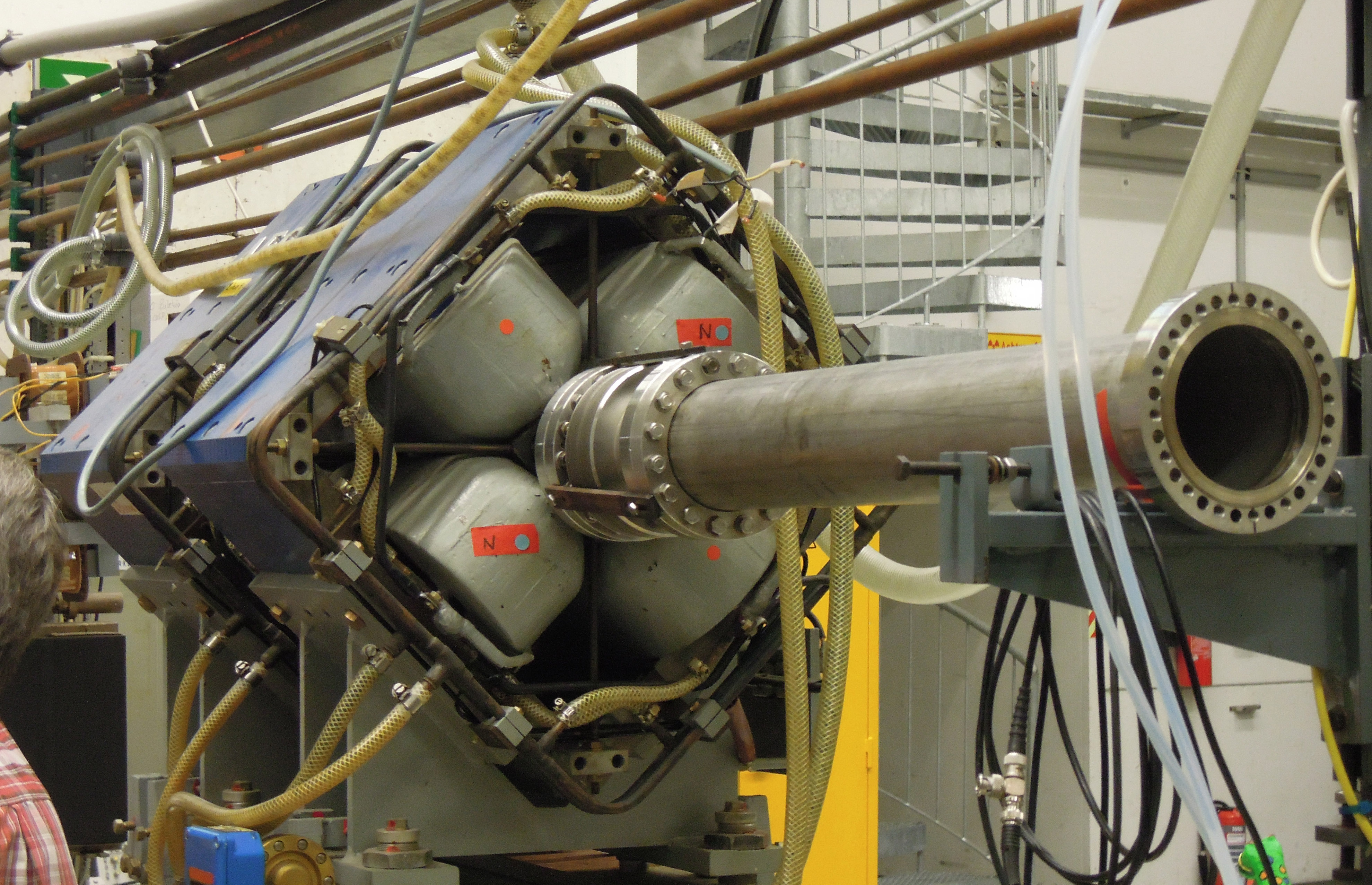 Maier-Leibnitz-Laboratorium: Magnetische Linse mit offenem Strahlrohr